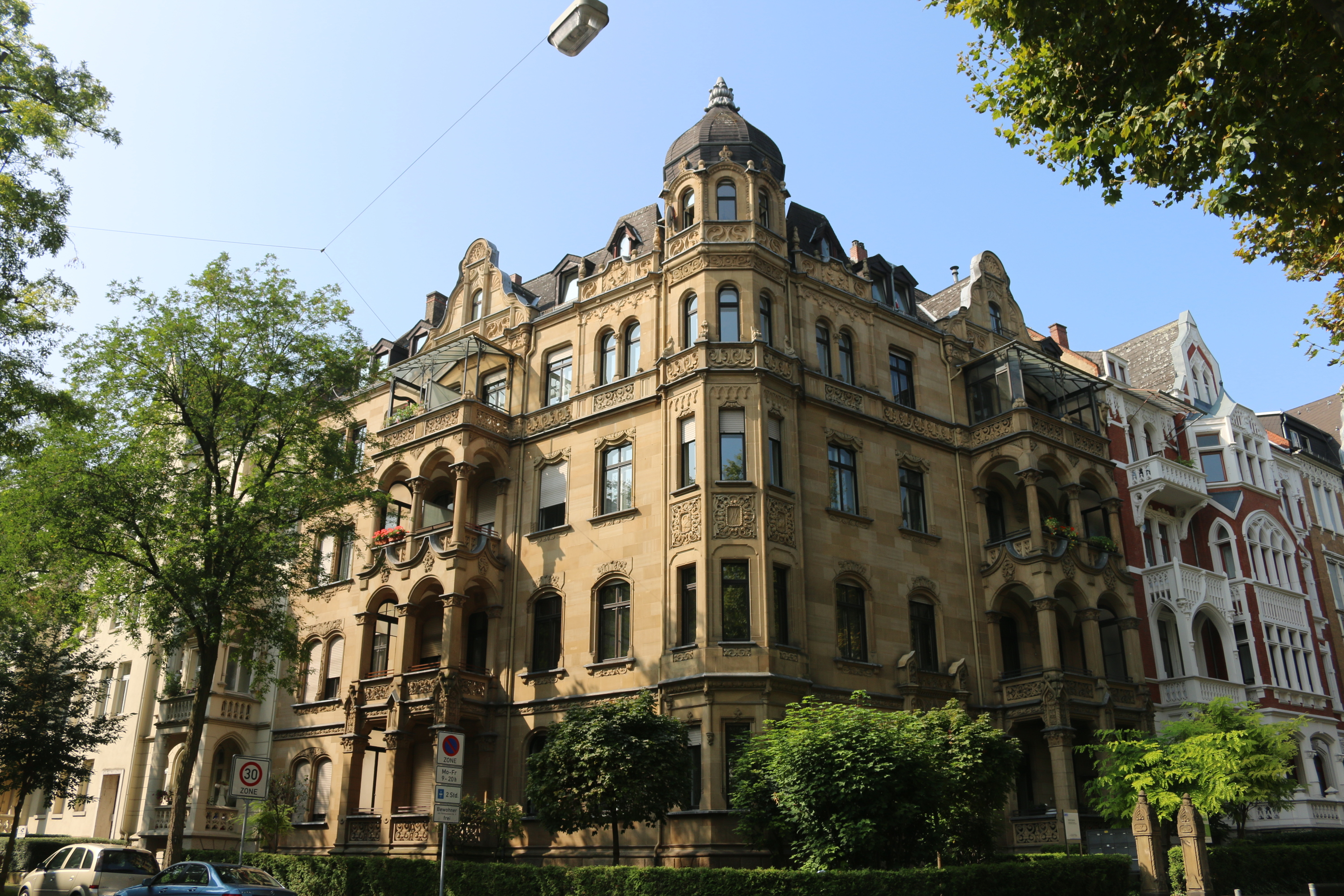 Haus Ecke Kaiser-Friedrich-Ring 67 Schenkendorfstraße in Wiesbaden